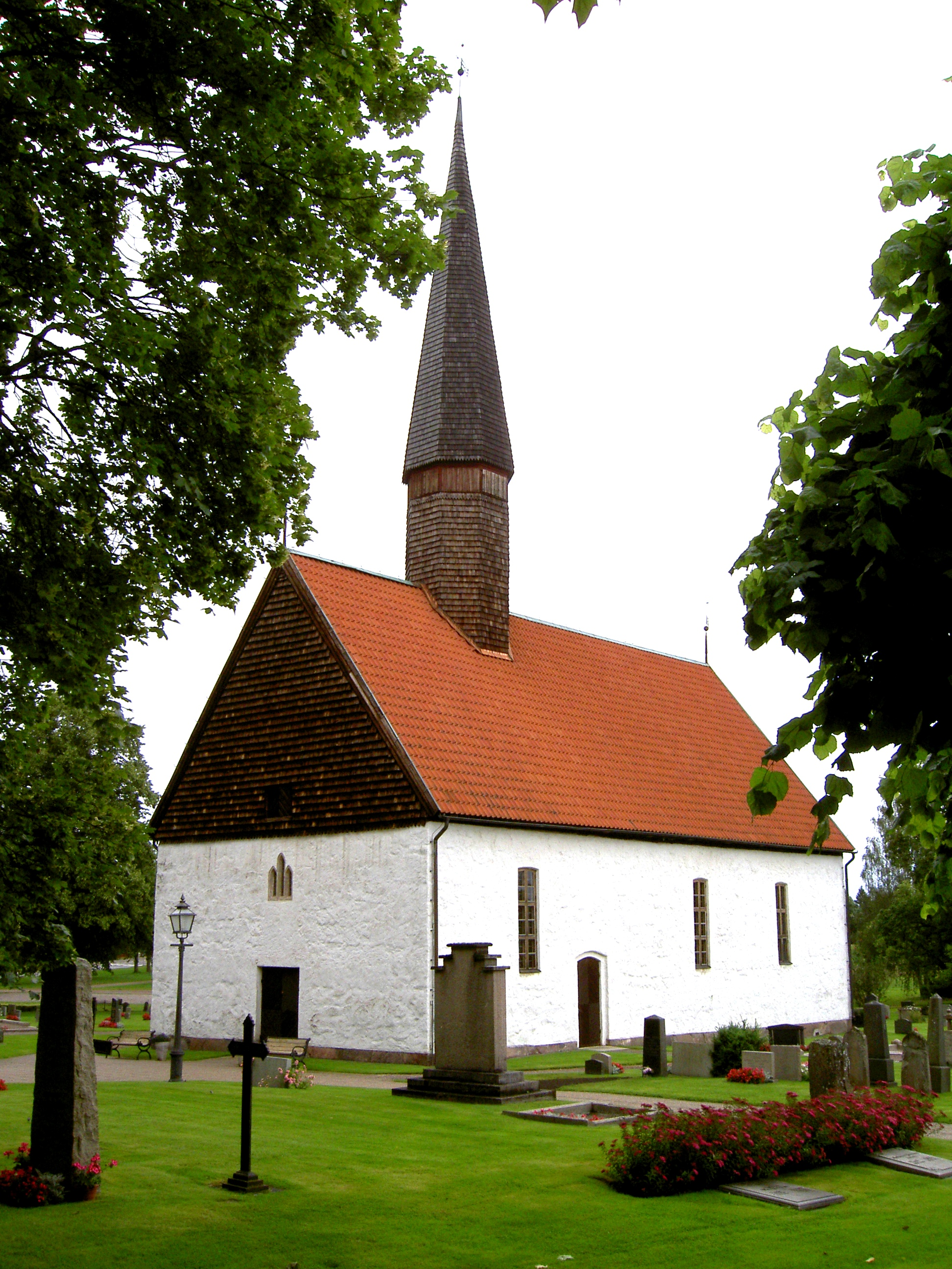 Mölltorps kyrka